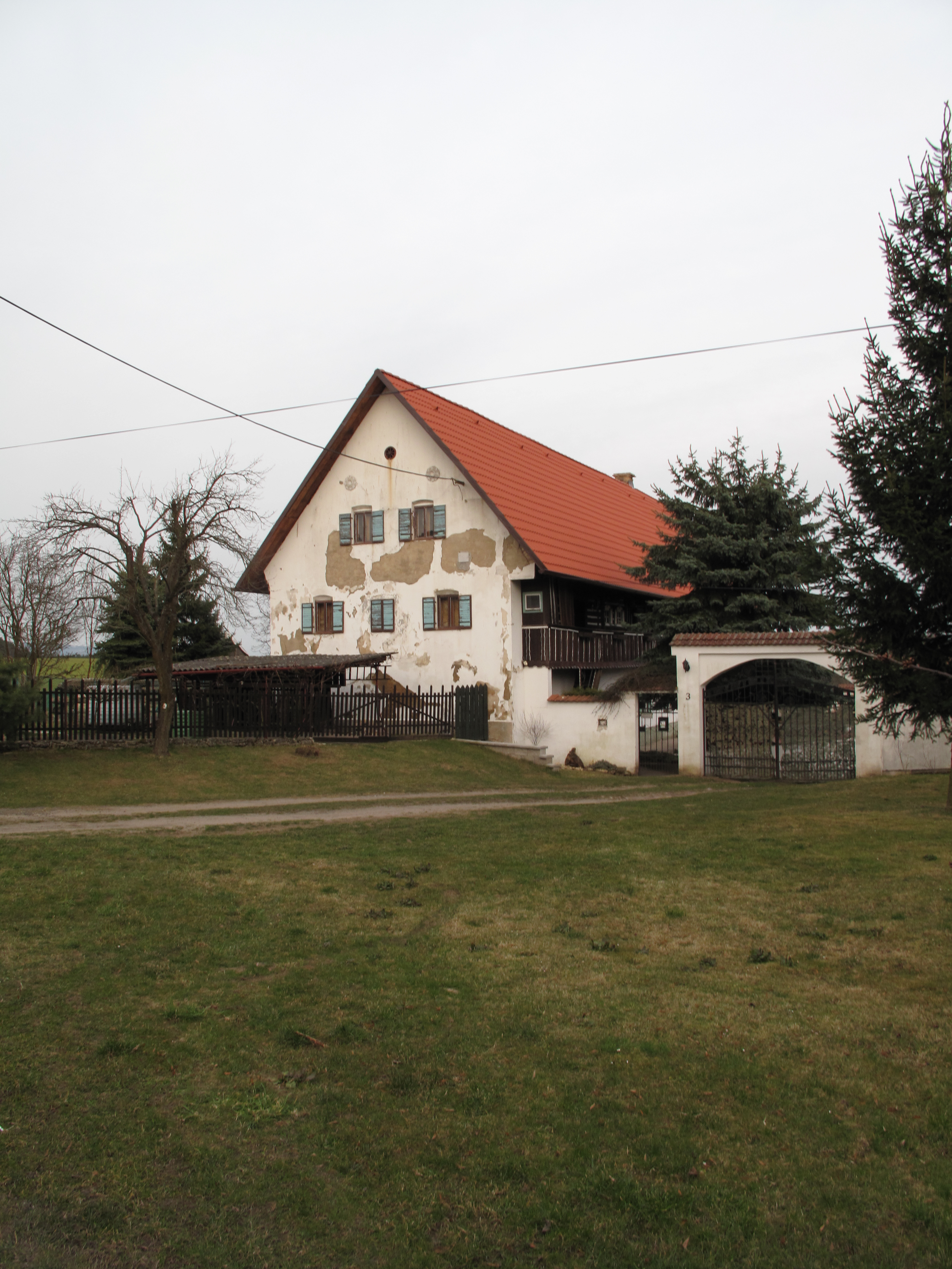 Statek ve Vorklebicích. Okres Liberec, Česká republika.